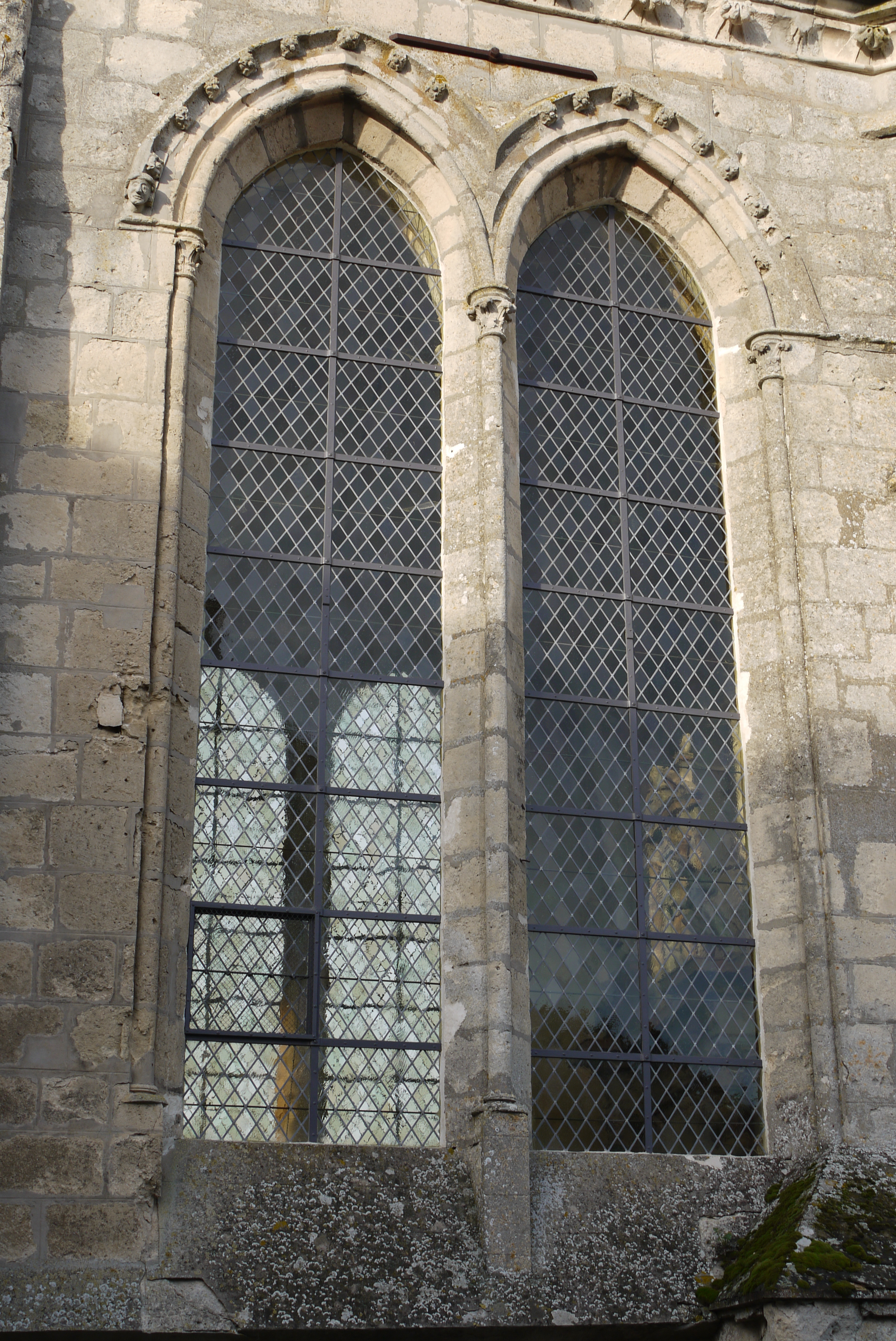 Détail de l'église Saint-Jean-Baptiste de Priez (Aisne)